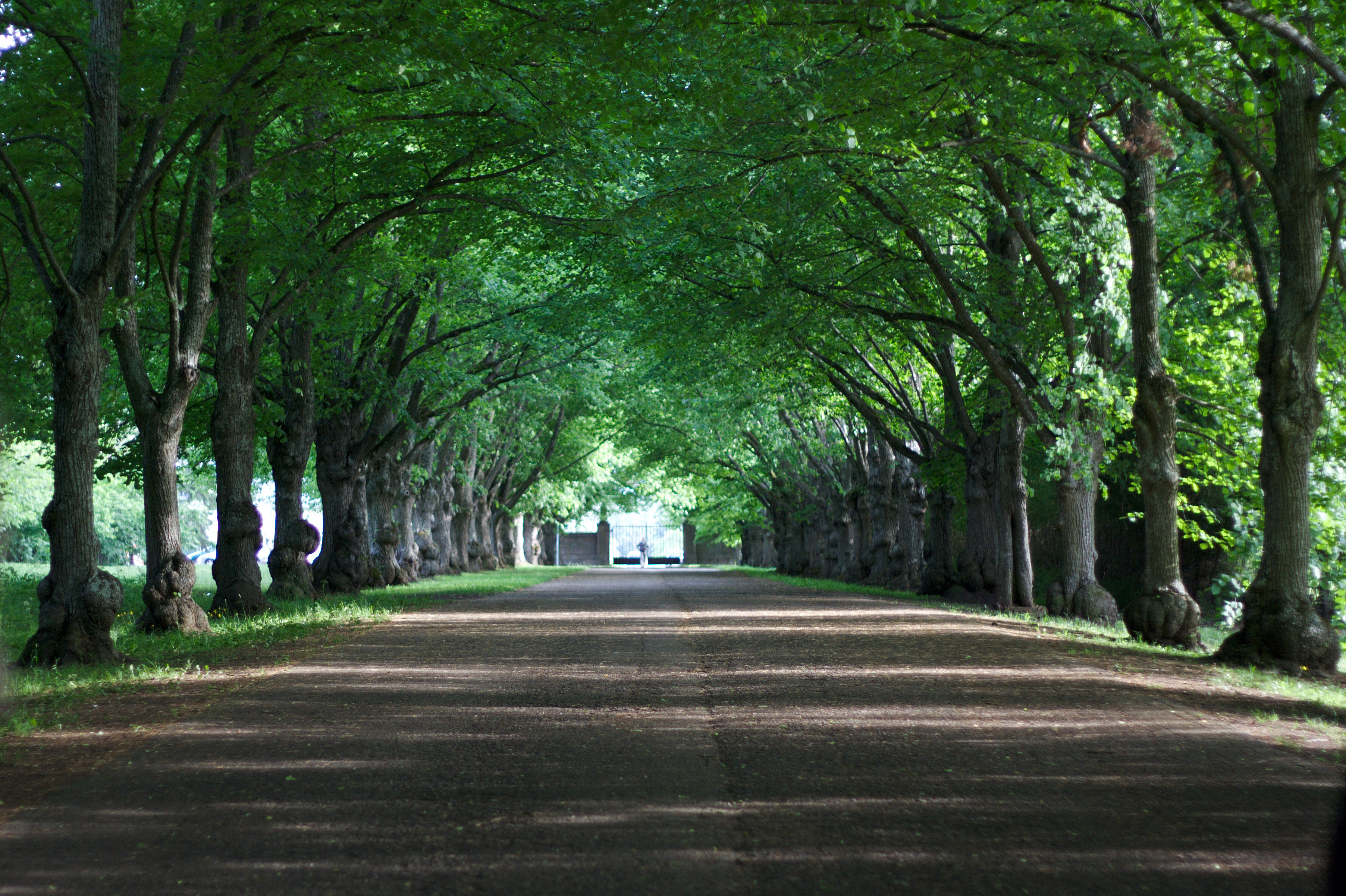 Allee Toila-Oru Parkis